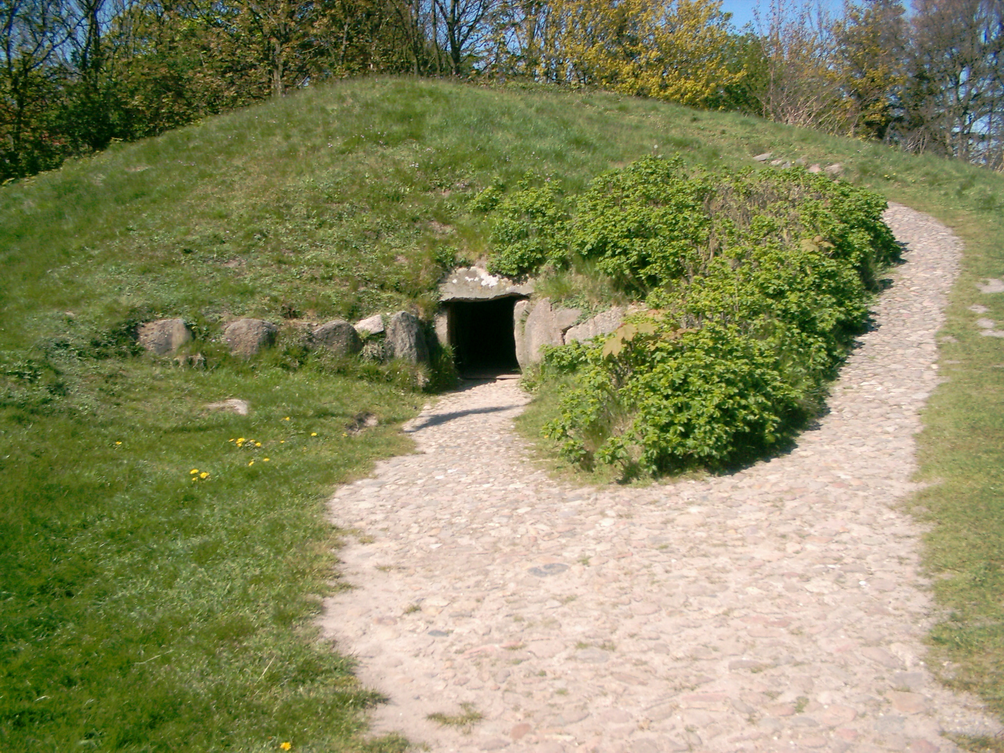 Denghoog er en jættestue på vadehavsøen Sild, Tyskland